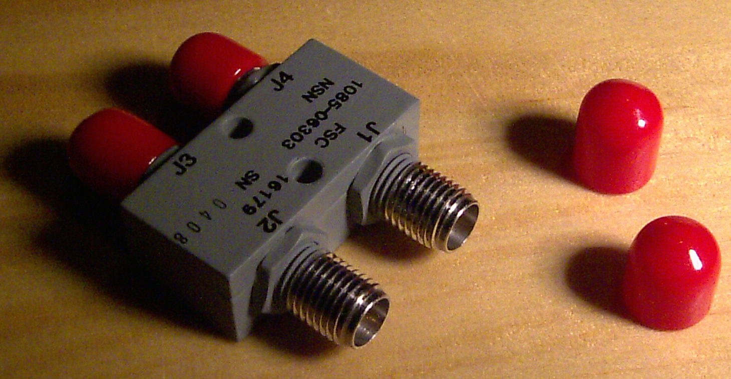 Híbrida terminada en SMA